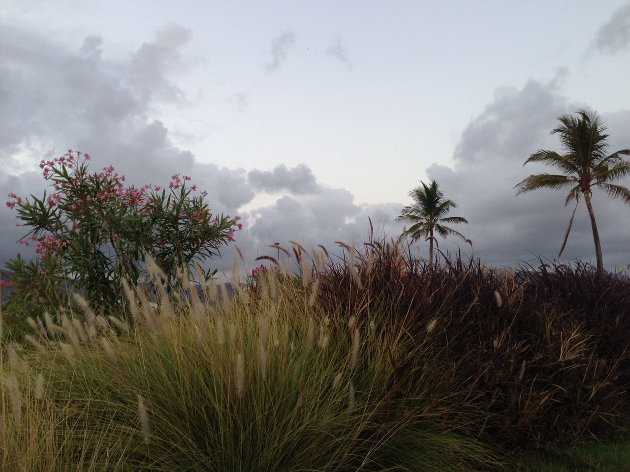 مناظر من أتين